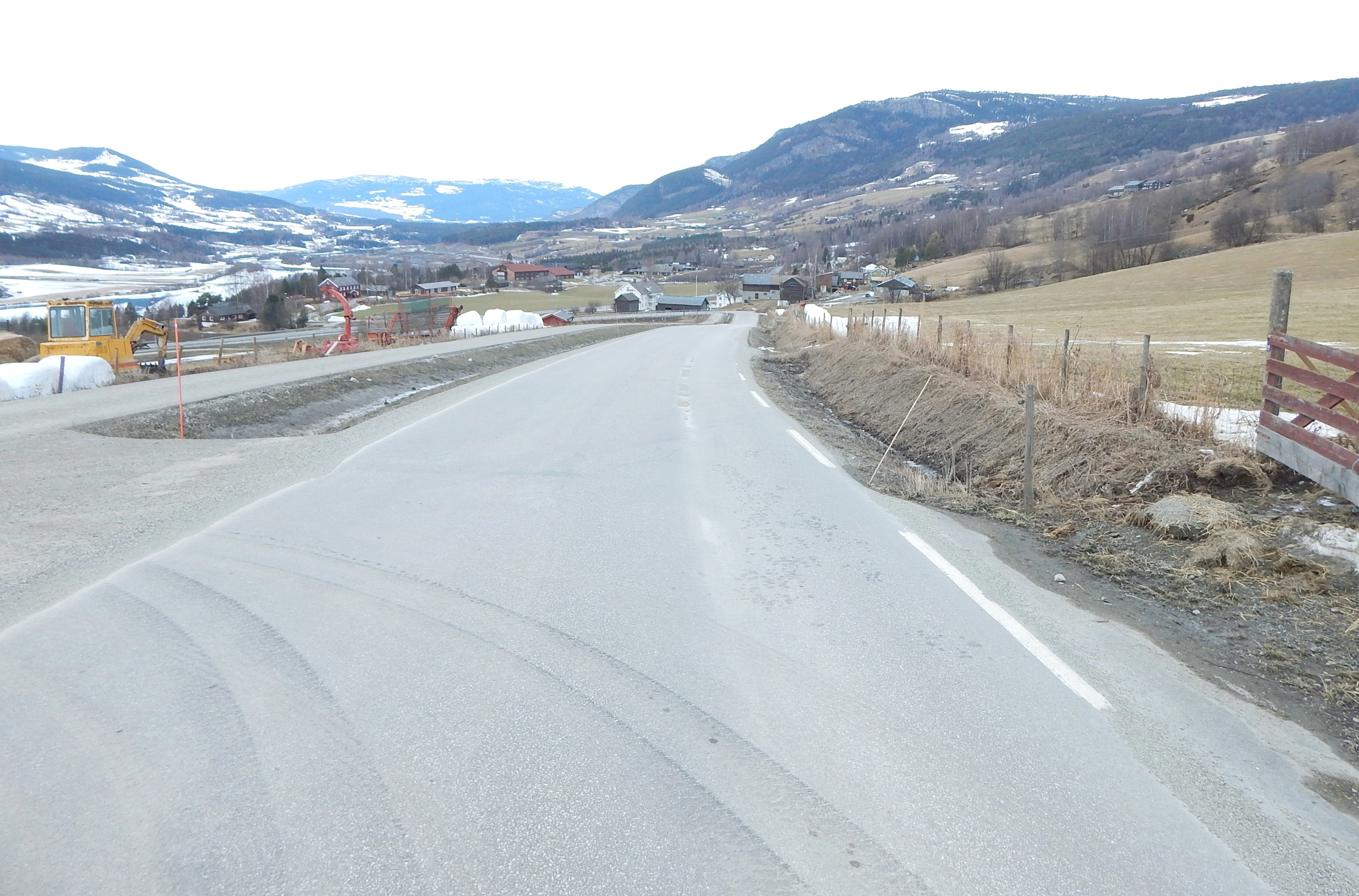 Øverbygdsvegen (fylkesvei 405) ved Listad på Hundorp